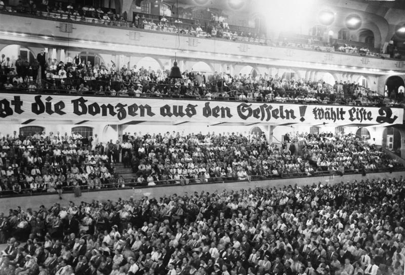 Berlin 1932 NS-Betriebszellen-Versammlung im Sportpalast